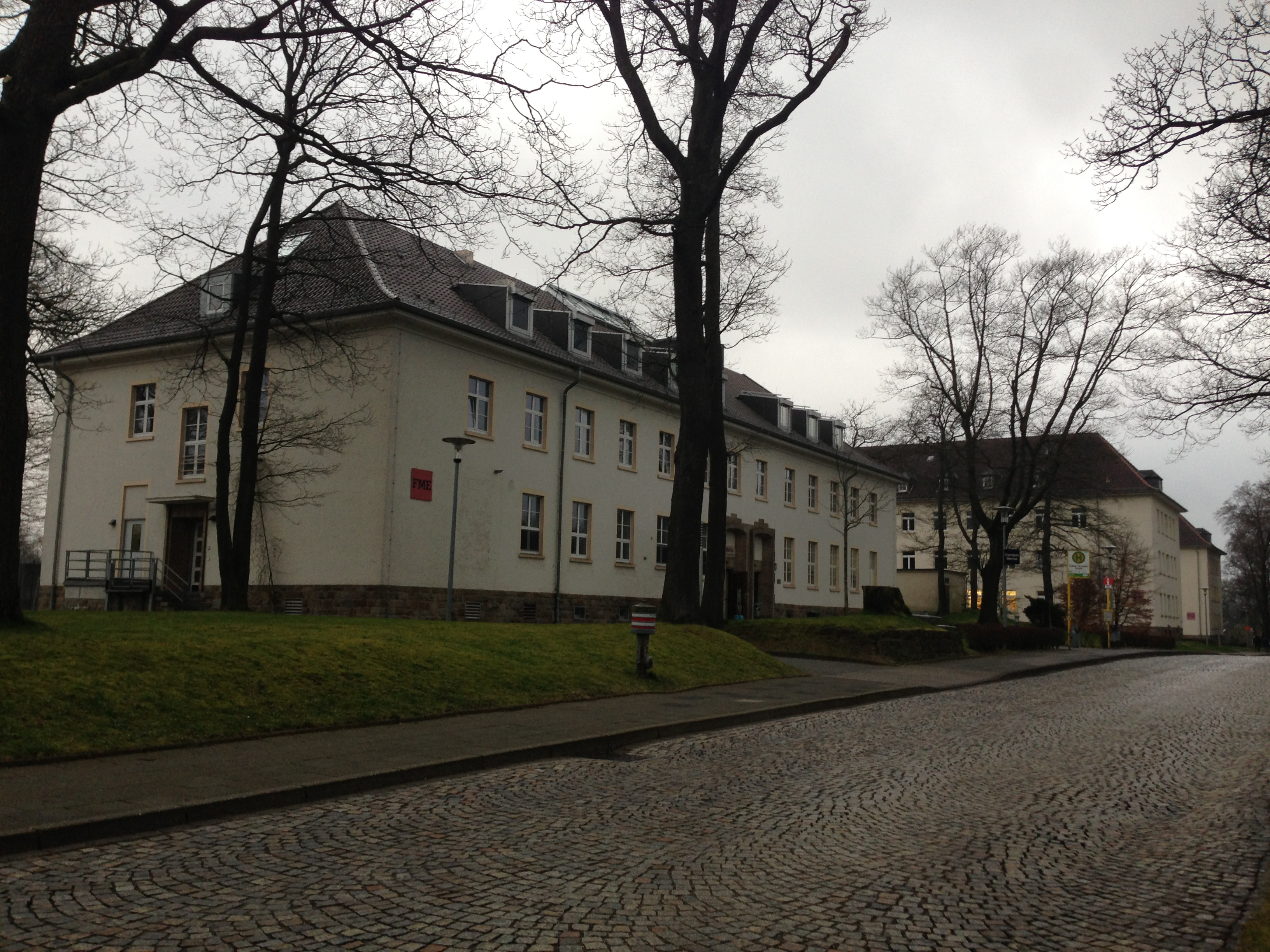 Gebäude des Campus Freudenberg der Bergischen Universität